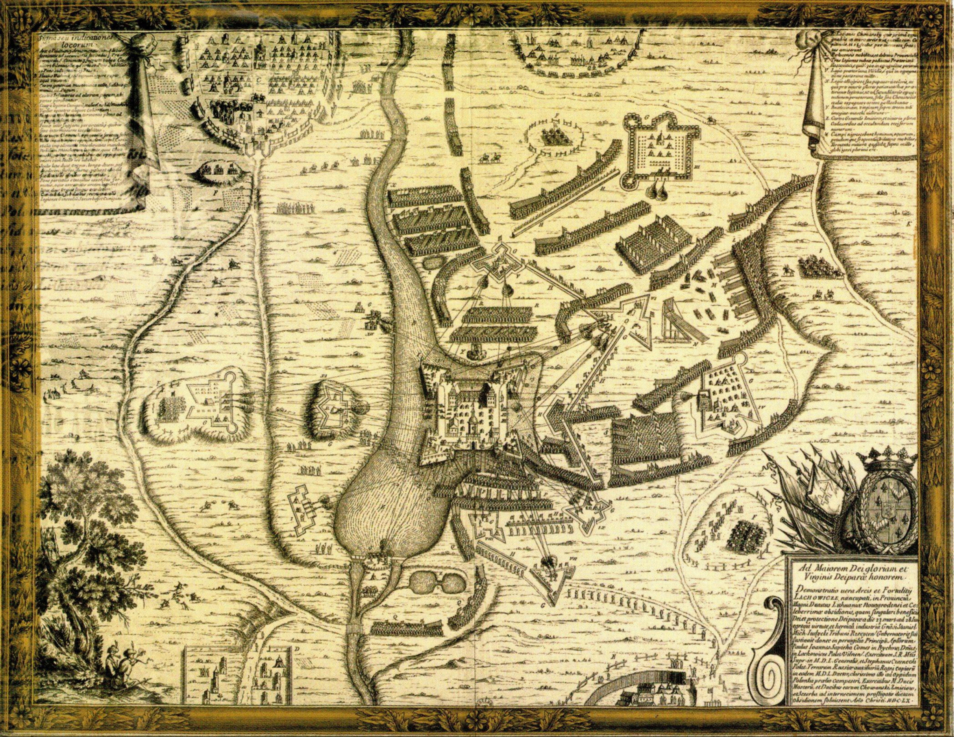 Осада Ляхович русскими войсками в 1660 году